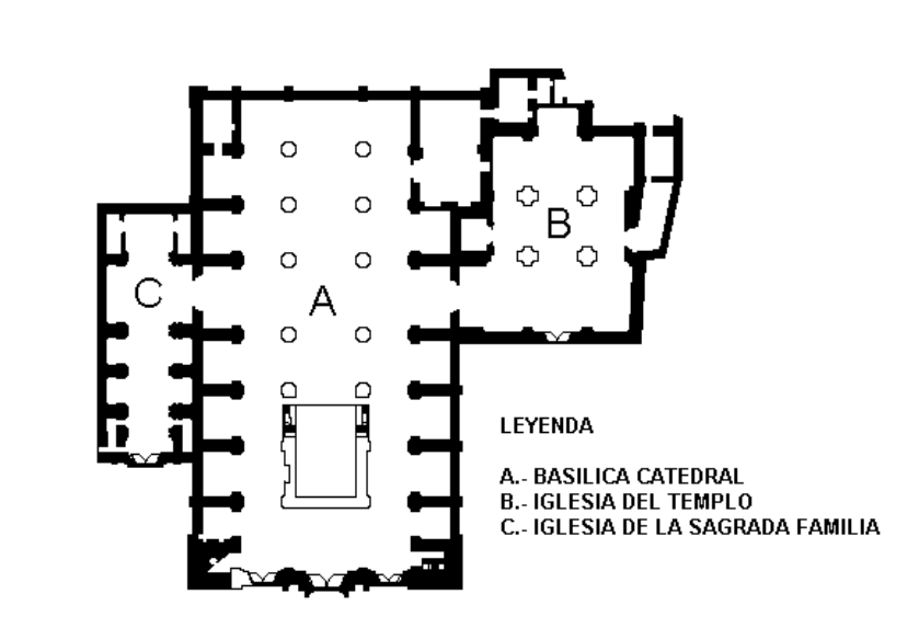 Planta de la catedral del Cusco y las iglesias del Triunfo y la Sagrada Familia.